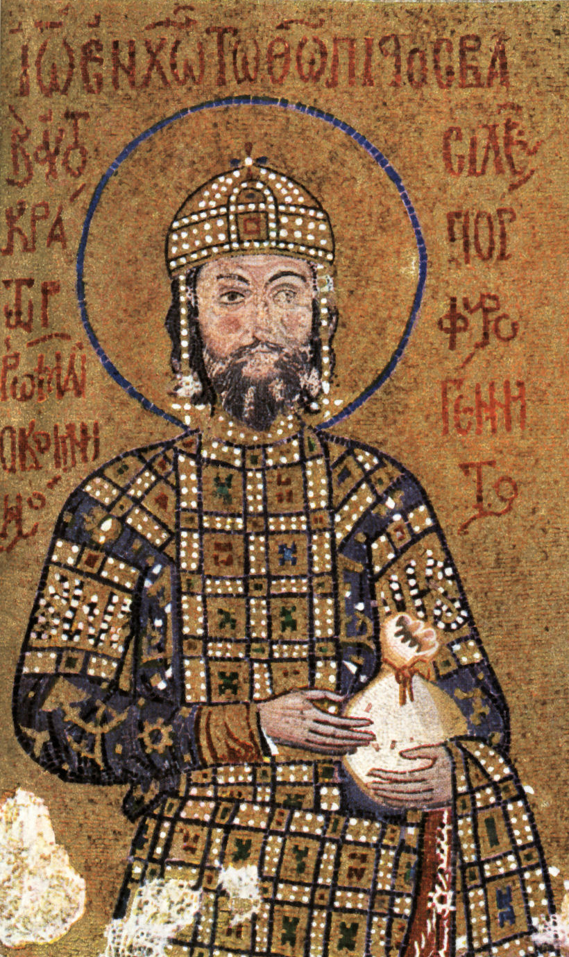 Copyright expiré, créateur mort il y a plus de 70 ans. L'Empereur Jean II Komnenos, extrait d'une mosaïque de l'Eglise Sainte-Sophie à Istanbul.